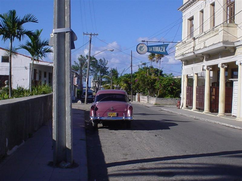 La Terraza en Cojimar